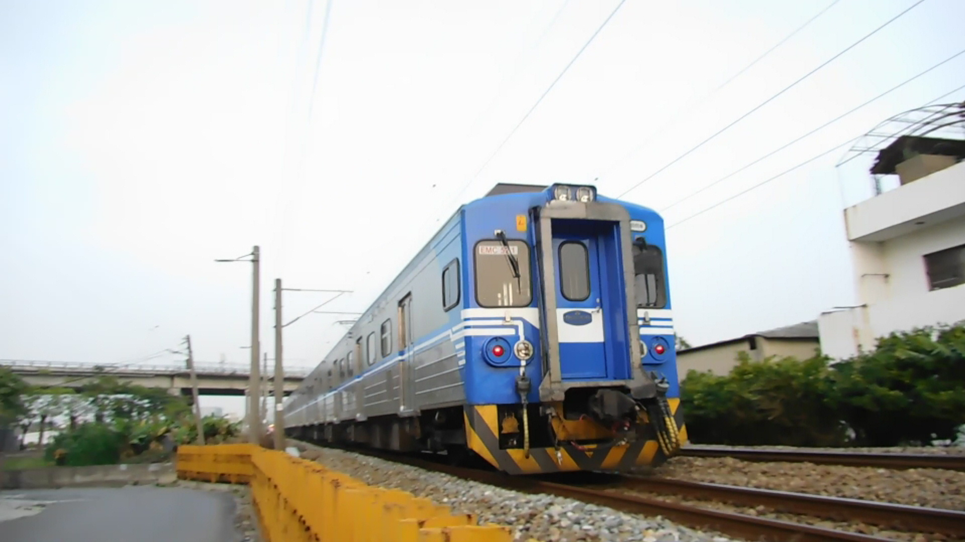 中文（台灣）: 臺灣鐵路管理局EMU500型電聯車EMU521。